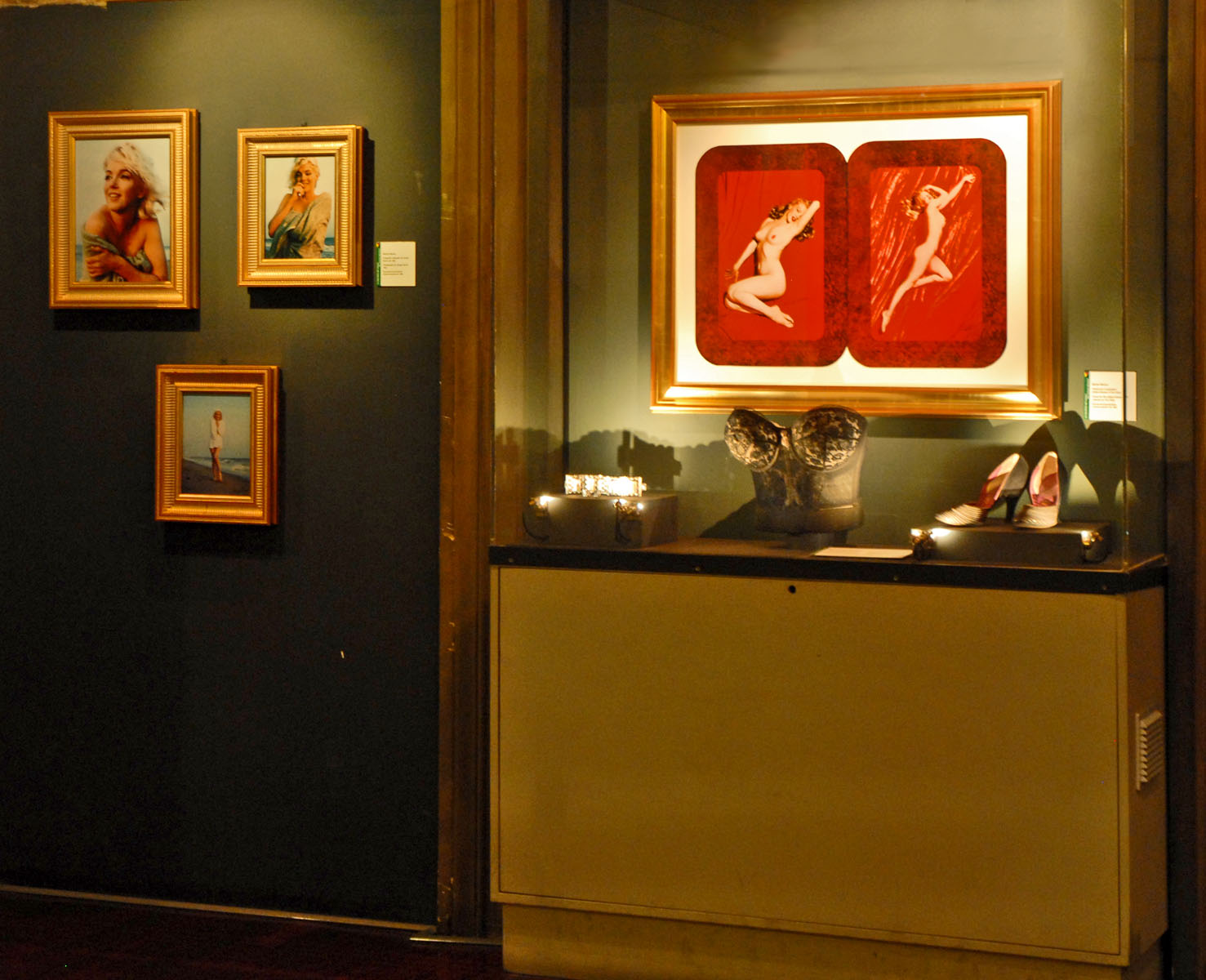 L'espace en hommage à Marilyn Monroe avec ses photos les plus connues et son bustier noir au centre dans la vitrine. Inauguré en 2000, le musée du cinéma est devenu le plus fréquenté des musées de la ville de Turin, avec 2,5 millions de visiteurs. Il est le plus grand d'Europe avec ses 3 200 m2, le plus riche grâce à l'immense collection que Maria Adriana Prolo a léguée à la commune en 1991, et le plus original par sa muséographie intégrée à la môle Antonelliana.